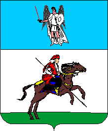 Герб Черкасc (1851)